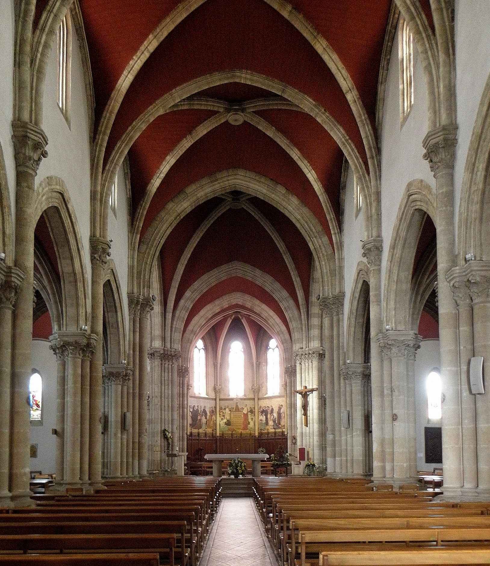 Notre-Dame d'Arcachon, intérieur